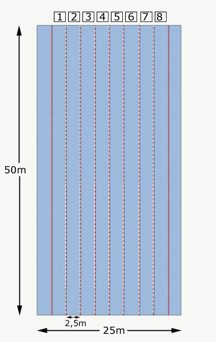 Maße für ein Schwimmbecken für die Olympischen Spiele erstellt von Snorky